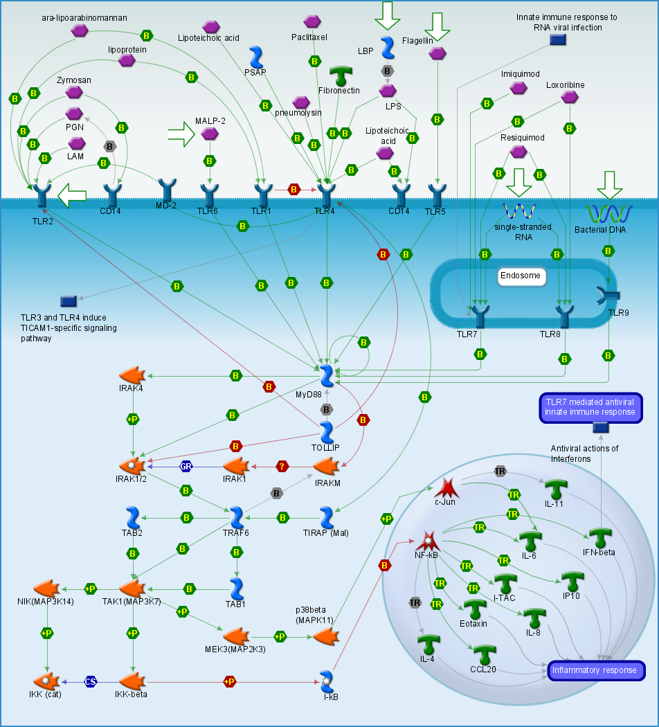 مسیر TLR